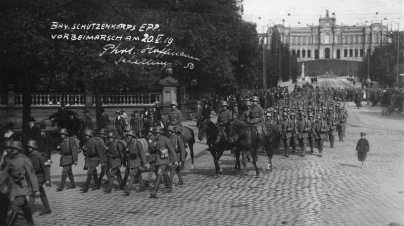 Bay. Schützenkorps EPP. Vorbeimarsch am 20.V.19